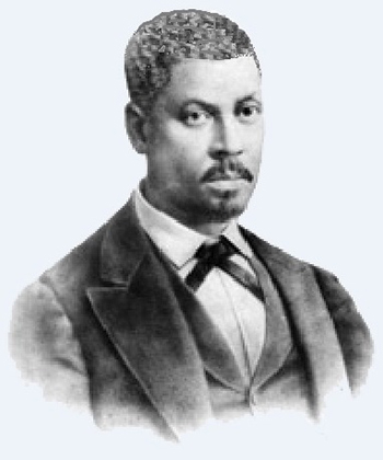 Antônio Pedro de Figueiredo (1814 — 1859), filósofo e jornalista brasileiro.